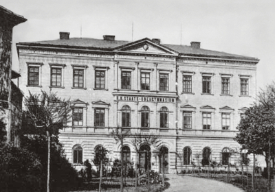 Budova Gymnázia v Kadani